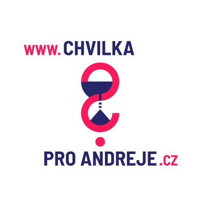 Logo